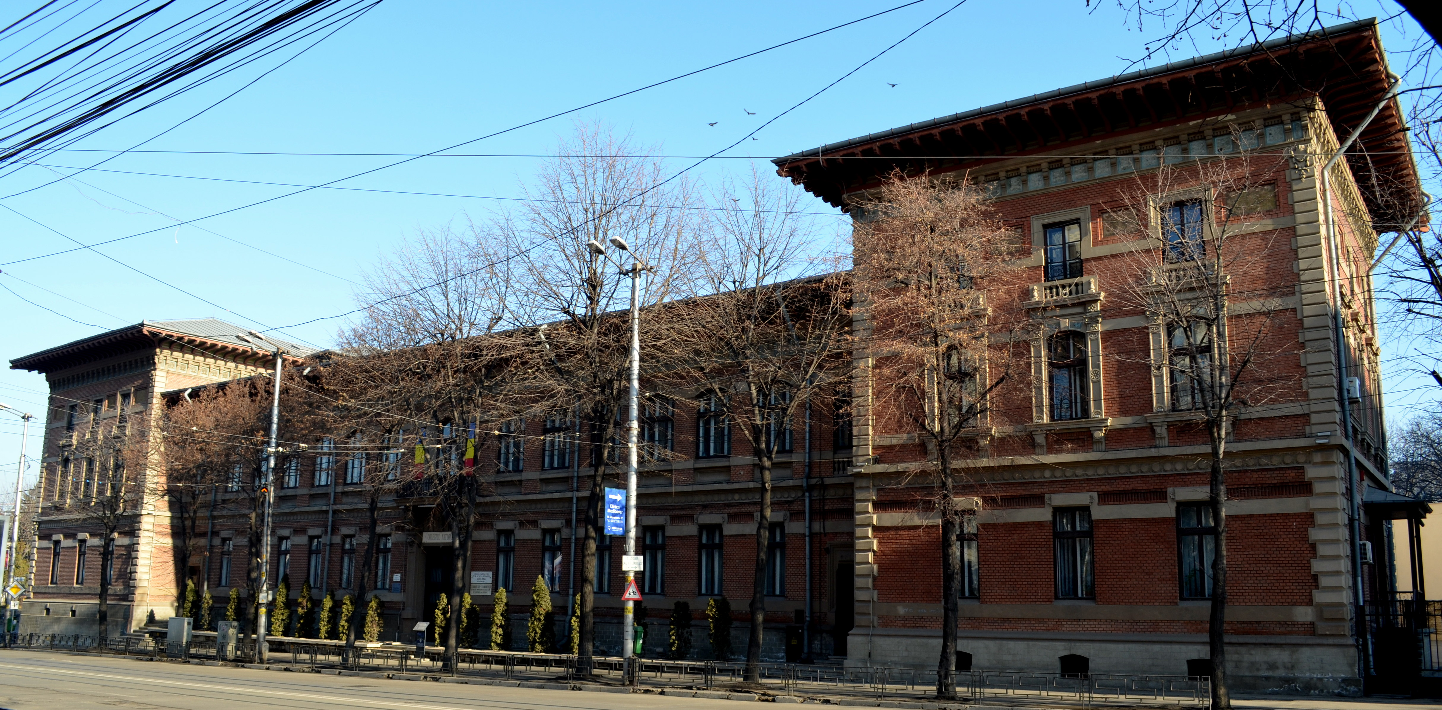 Colegiul Național, Str. Arcu nr. 4, Iași